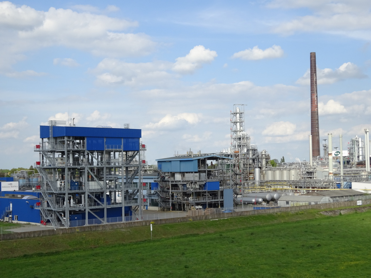 KLK Emmerich GmbH, Emmerich am Rhein